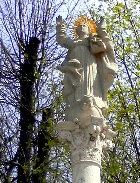 Barokový stĺp pod sochou Panny Márie s podstavcom (Mariánsky stĺp) je vedený v zozname národných kultúrnych pamiatok SR. Doba vzniku 1724. Baroková socha Panna Mária-Immaculata (Nepoškvrnená Panna Mária) je vedená v zozname národných kultúrnych pamiatok SR. Doba vzniku 1724. Radničné námestie. Mesto Spišská Nová Ves.